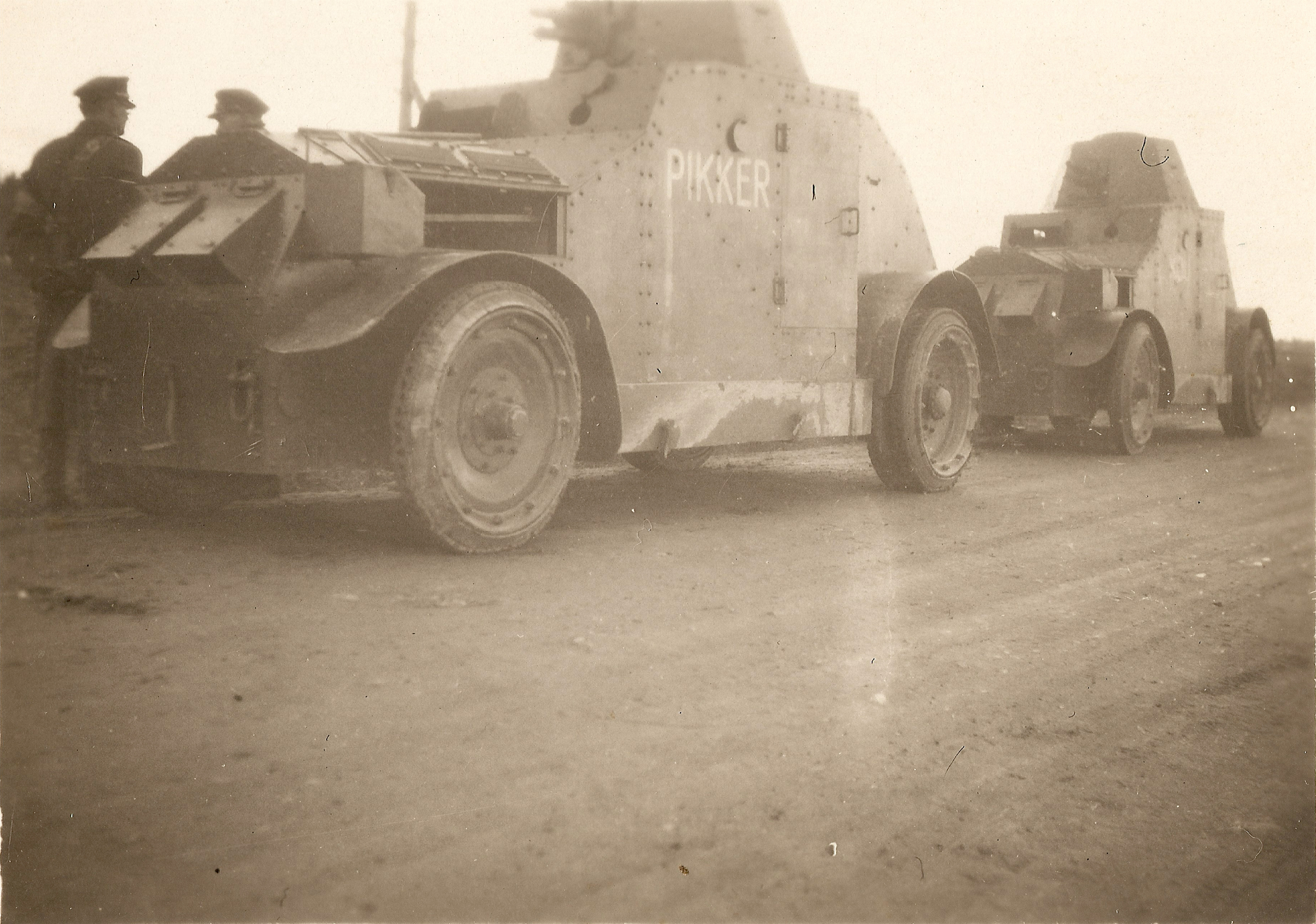 Kaitseliidu soomusautod Arsenal-Crossley "Pikker" ja "Kõu"